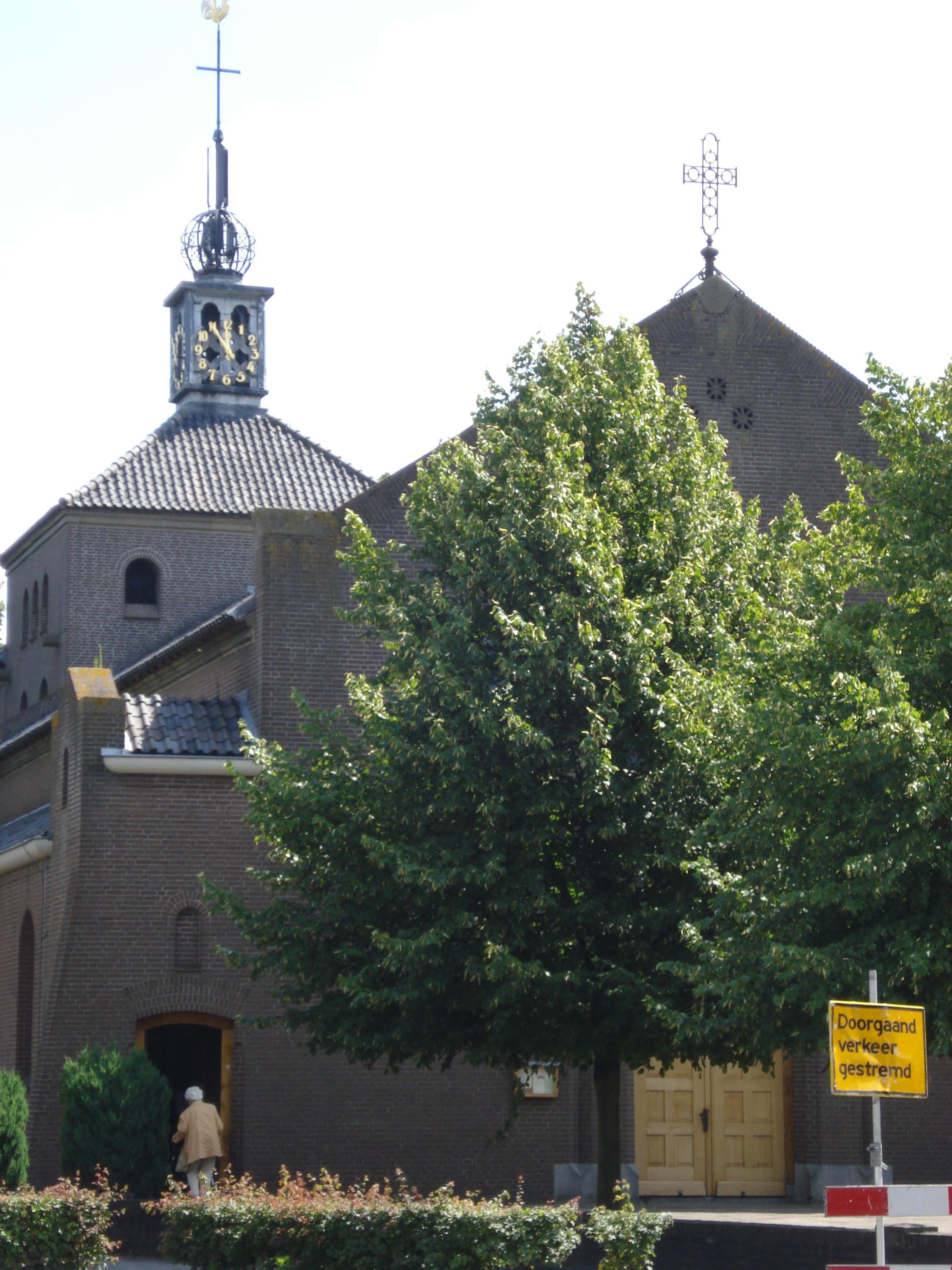 Empel, l'église